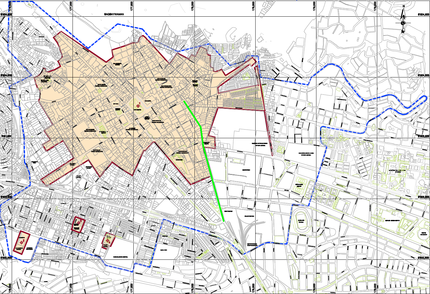 Trazo de la avenida Tullumayo en la ciudad del Cusco